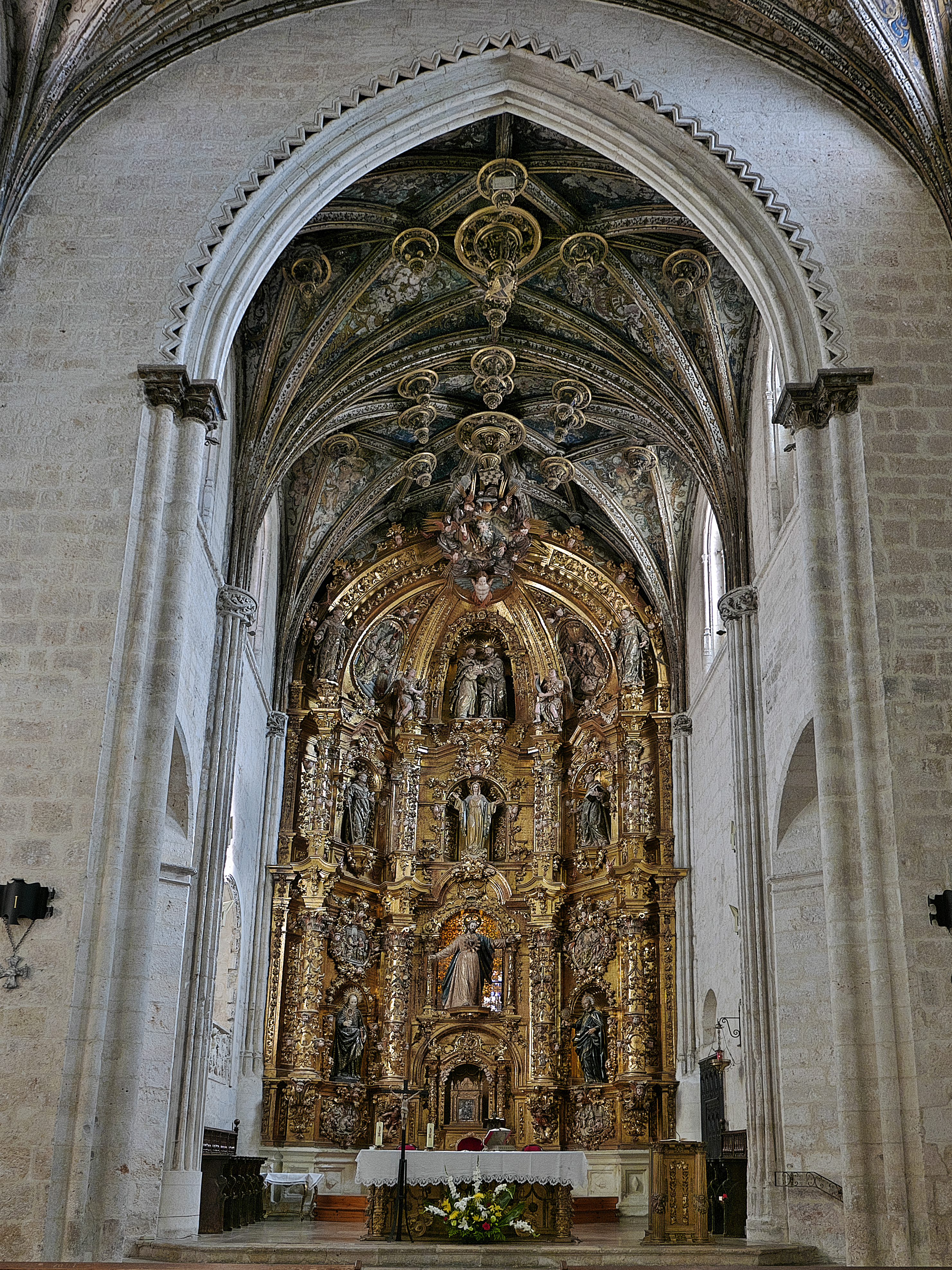 Iglesia de San Francisco (Palencia. Capilla mayor con retablo (1732) de Pedro de Correas; escultura de Pedro de Correa; policromía de Cristóbal Estrada y Alonso Santos; y dorado por Manuel de Calderón y Manuel Puertas.